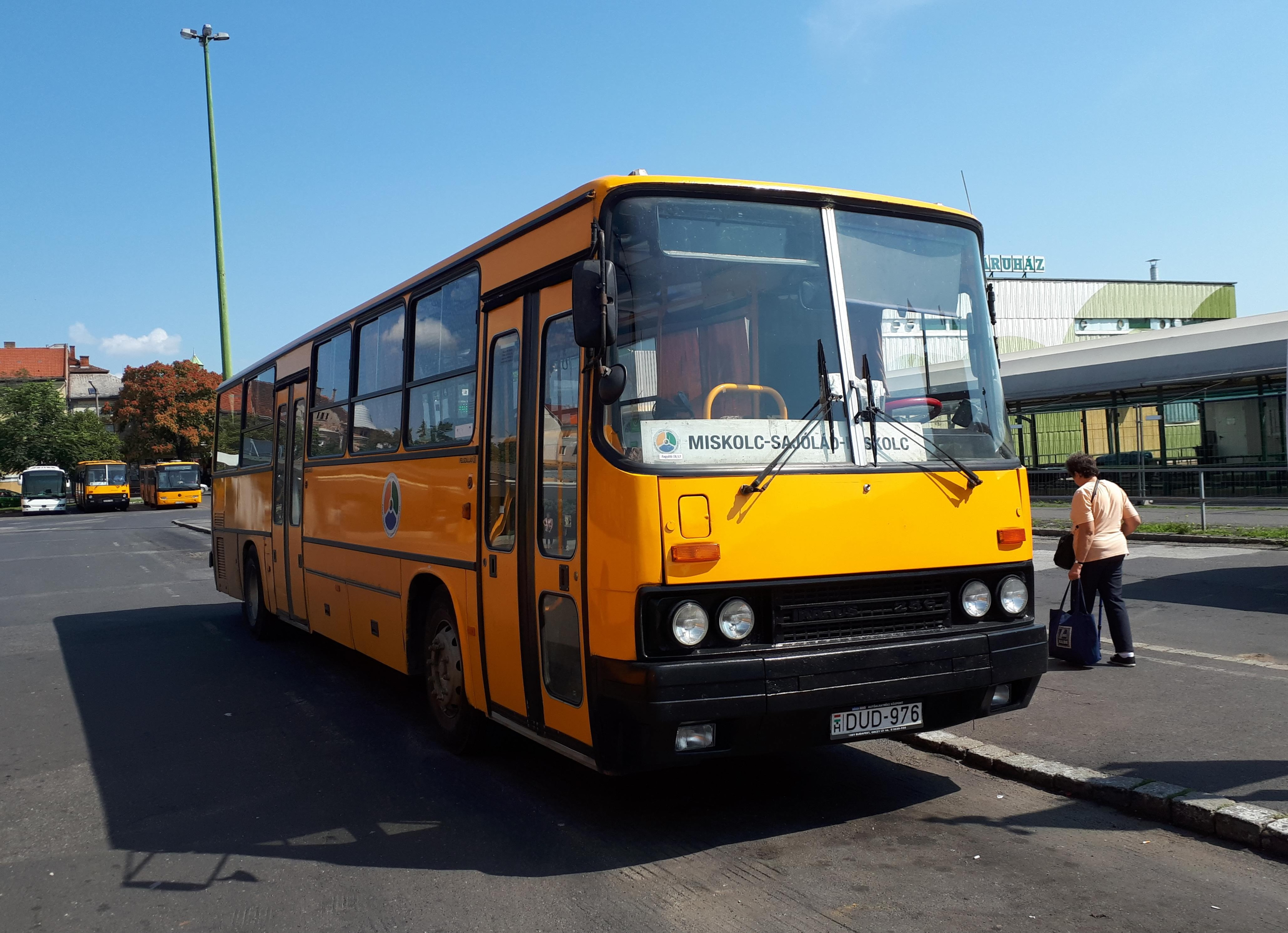 Az ÉMKK DUD-976 rendszámú Ikarus 256 típusú busza Miskolcon, a 3735-ös helyközi járaton.